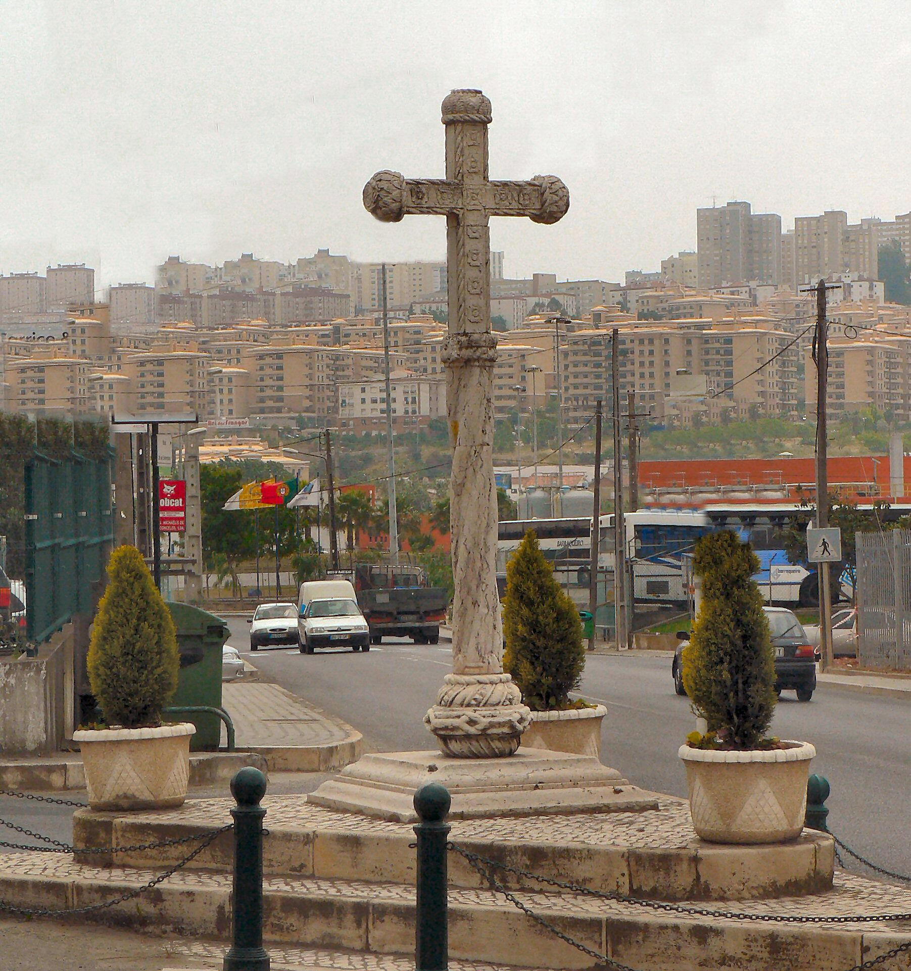 Cruzeiro de Frielas